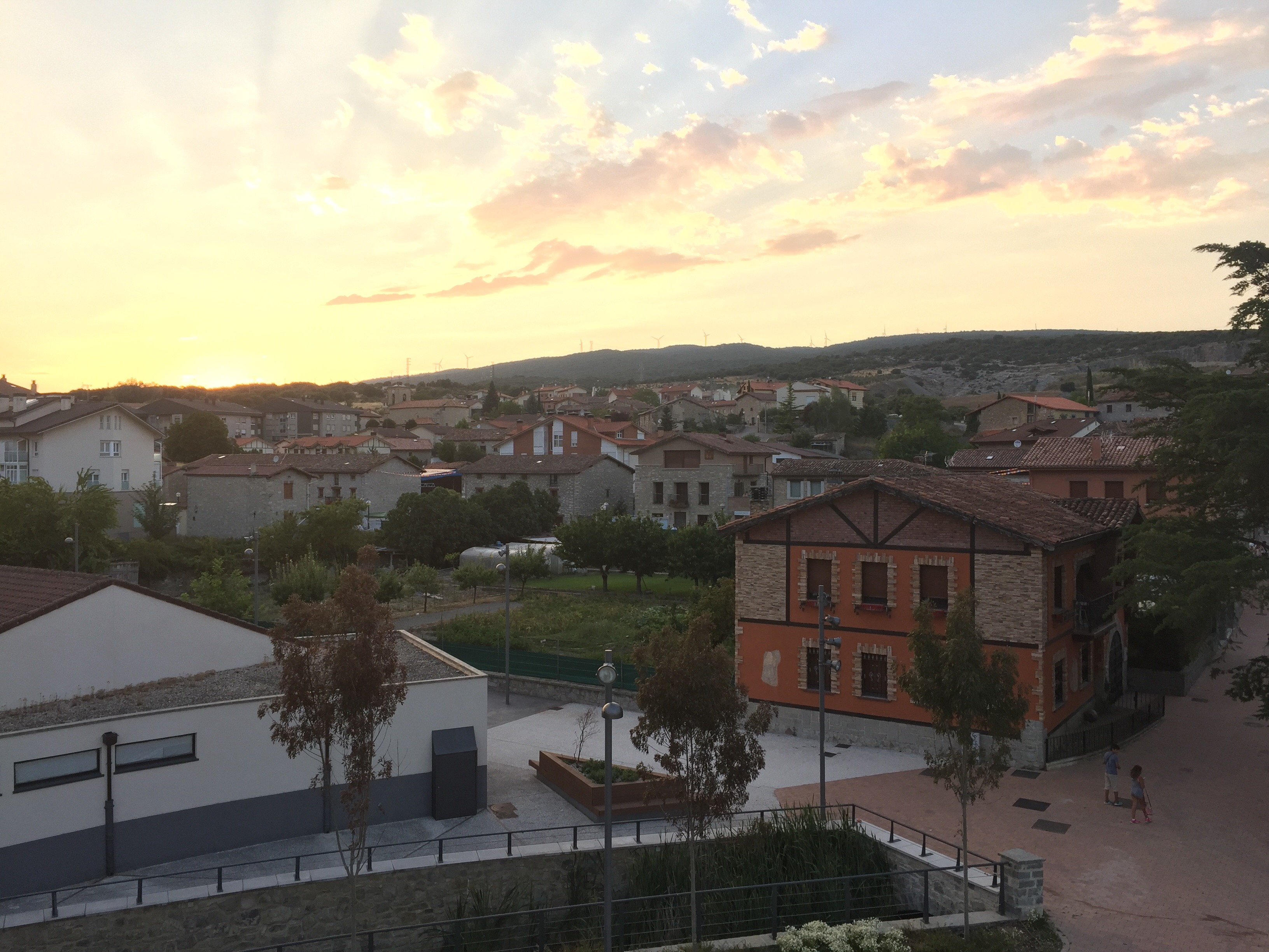 Nanclares de la Oca (Álava, País Vasco) visto desde el Calero.